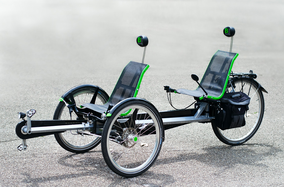 BamBuk auf geteertem Grund